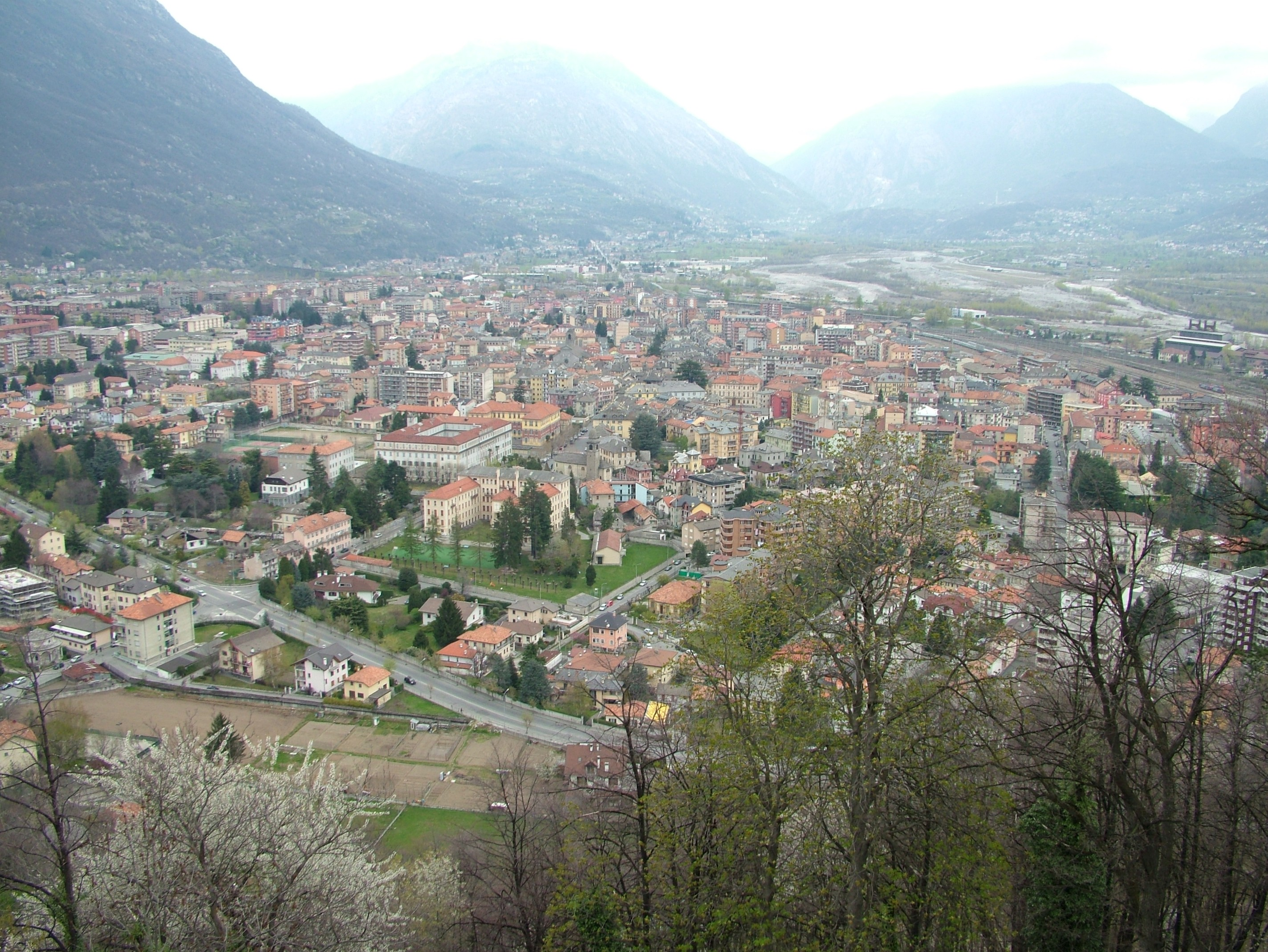 Domodossola, Piemont, Italien, Übersicht